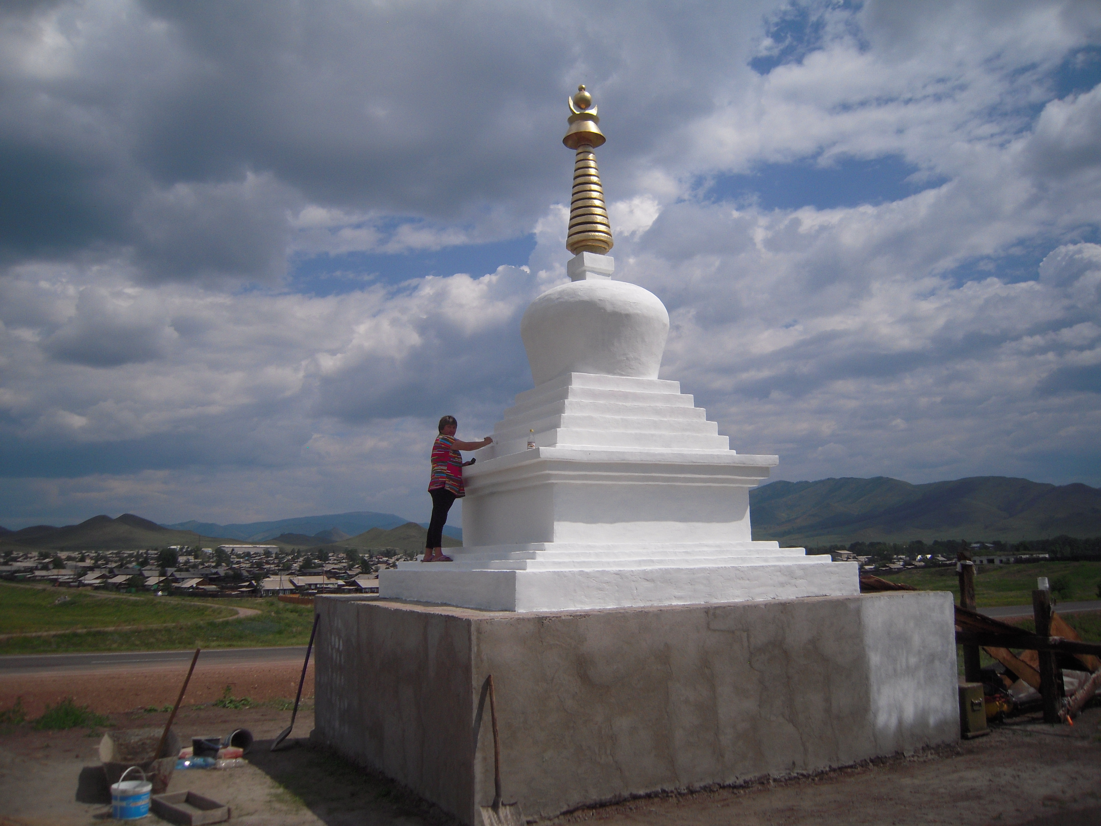 Строительство Субургана 24.07.2012г.. Республика Тыва, город Туран, Пий-Хемский кожуун.